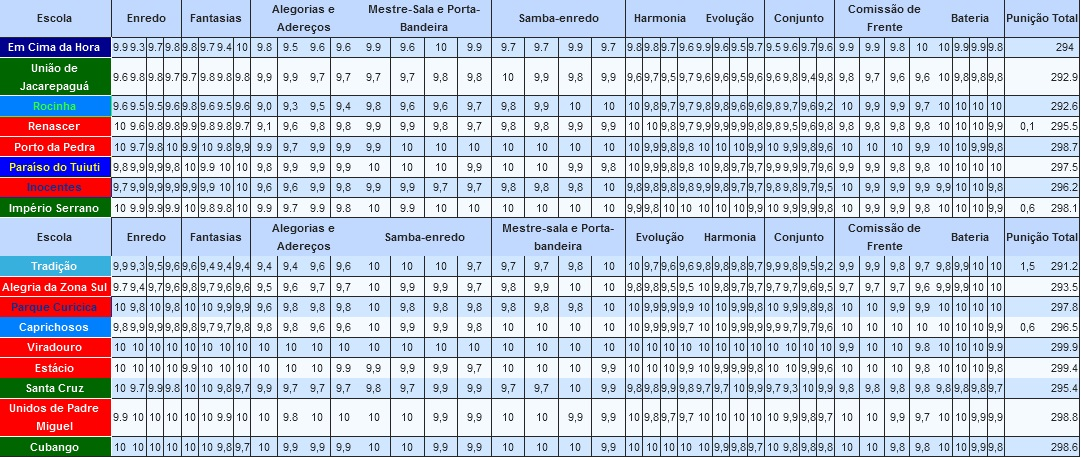 Resultados do Carnaval do Rio - 2014 - Acesso